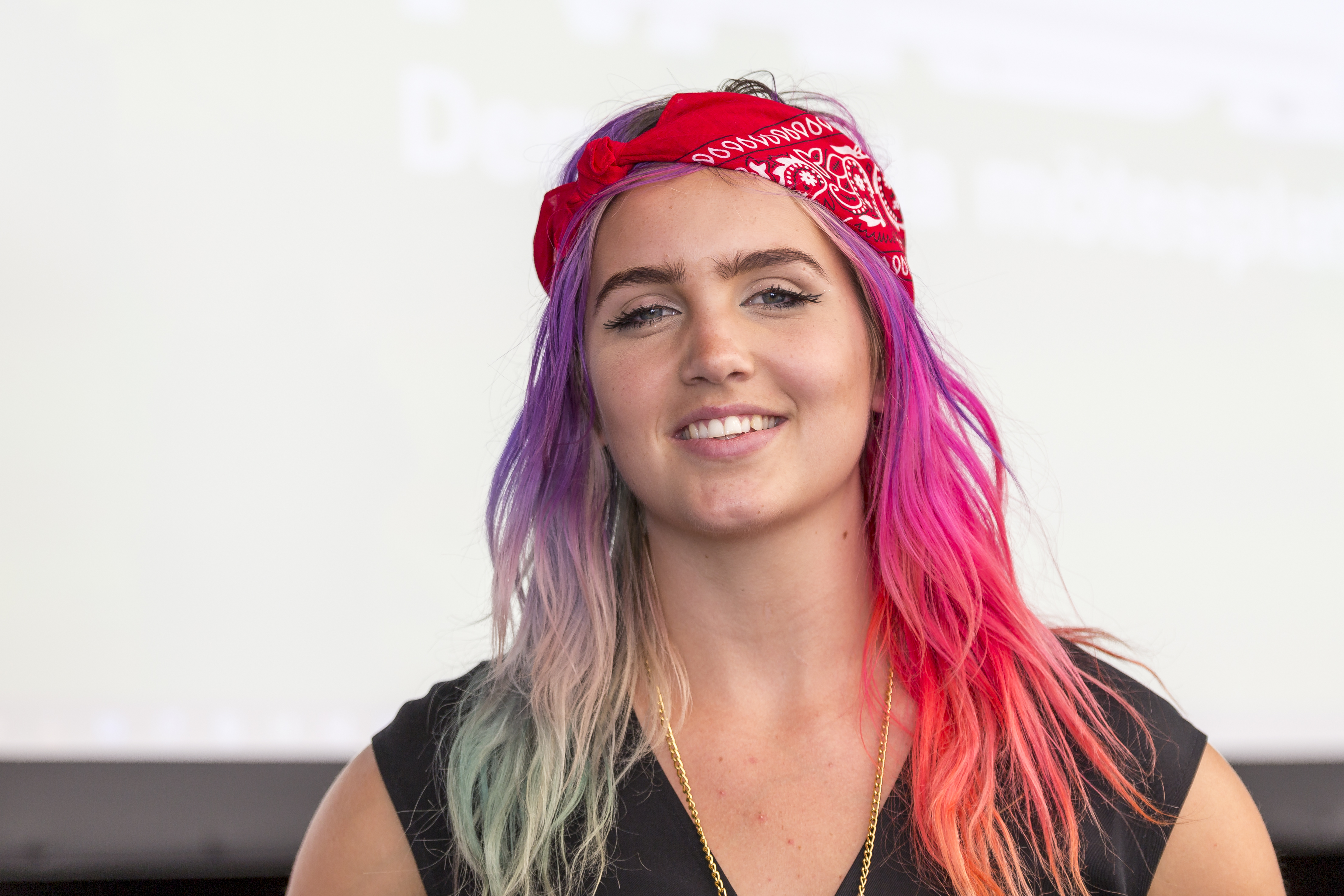 Under ett fullsatt seminarium i Almedalen den 5 juli 2017 om Unga ledares visioner medverkade Linnéa Claeson.